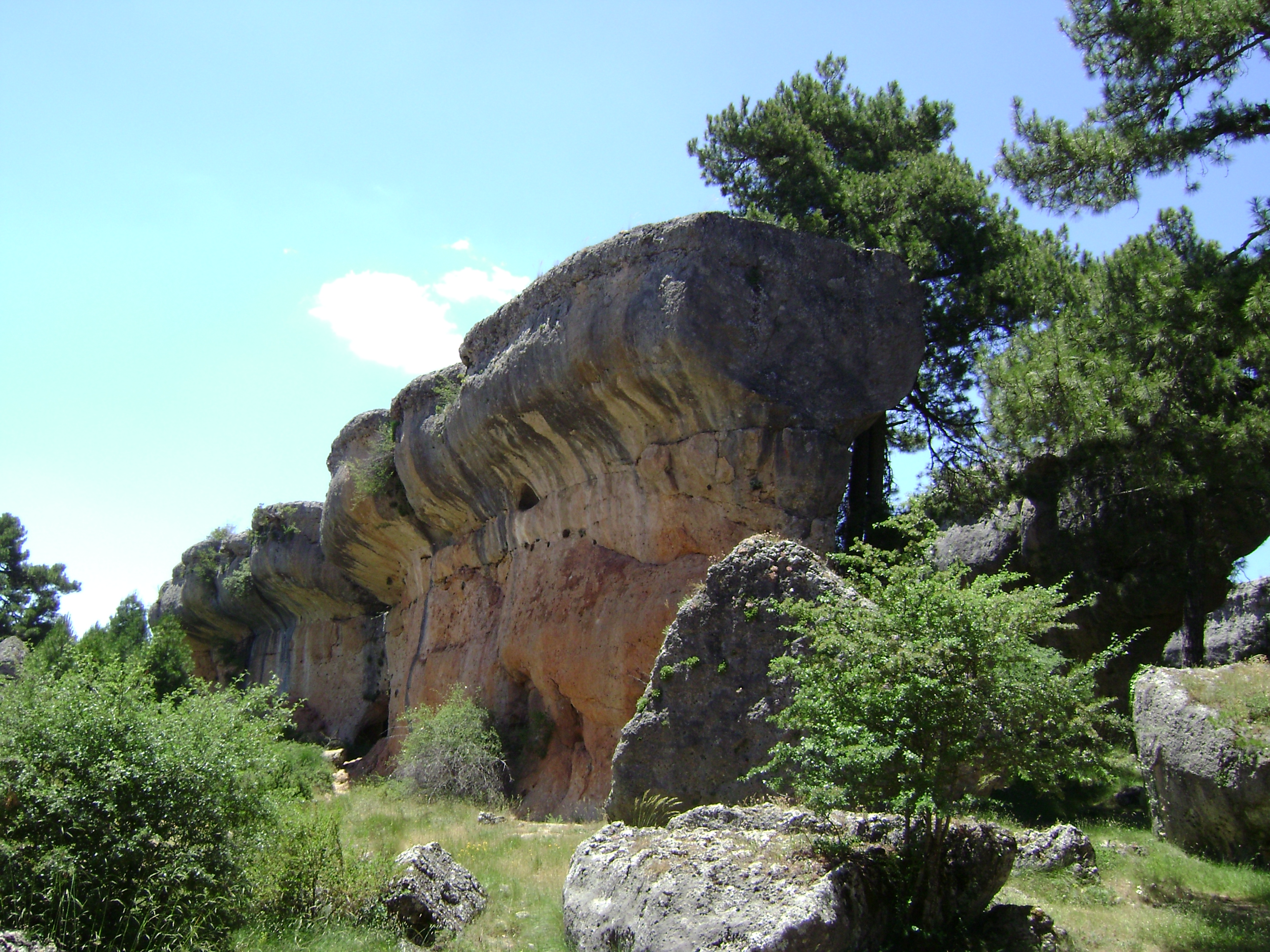 Parc de la Ciudad encantada (Provincia de Cuenca)